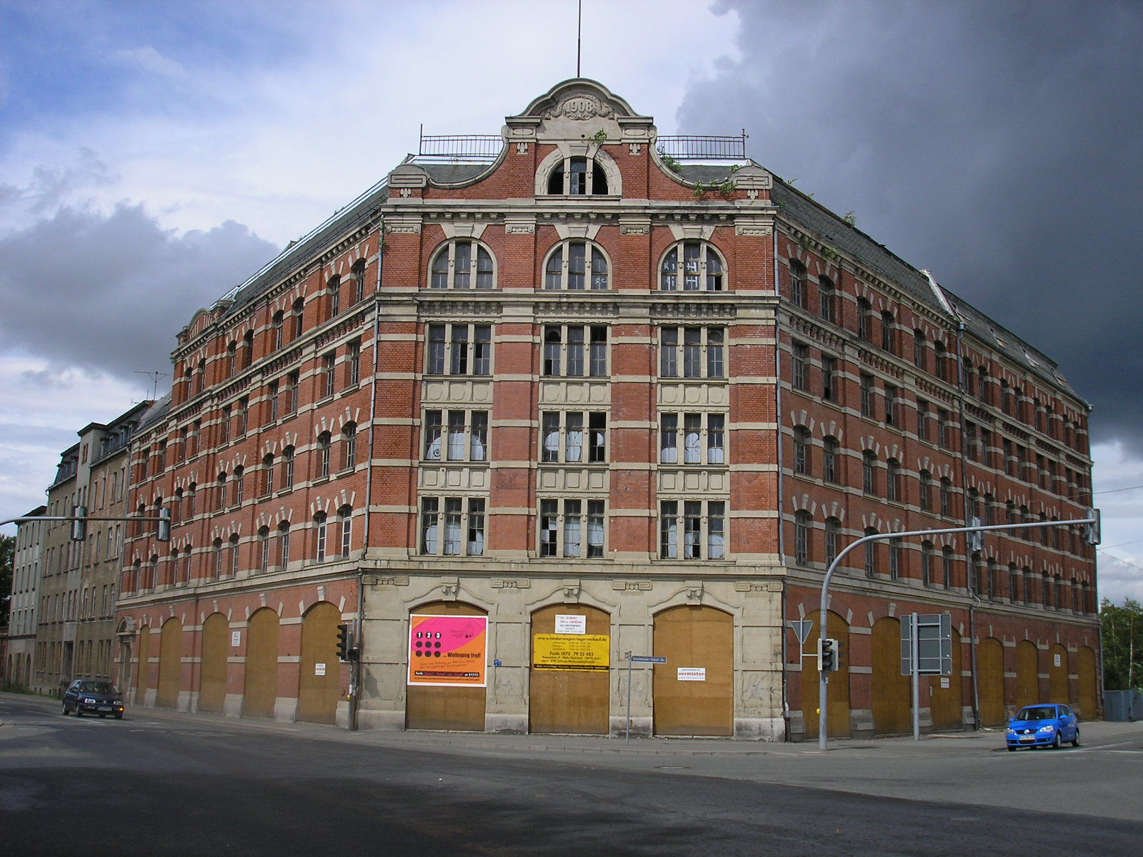 Das leerstehende Fabrikgebäude der Kinderwagen und Holzwarenfabrik E.A.Naether in Zeitz.